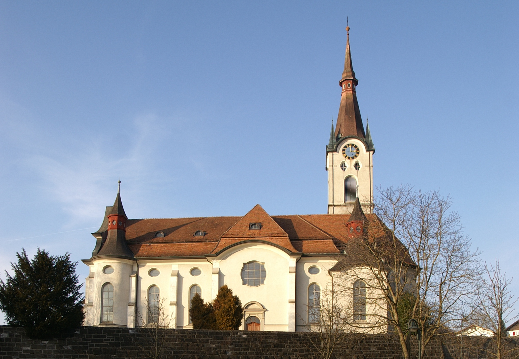 Pfarrkirche Hl.Kilian, 1905-1907 erbaut nach Plänen von Albert Rimli im Neobarock. Koblach, Vorarlberg